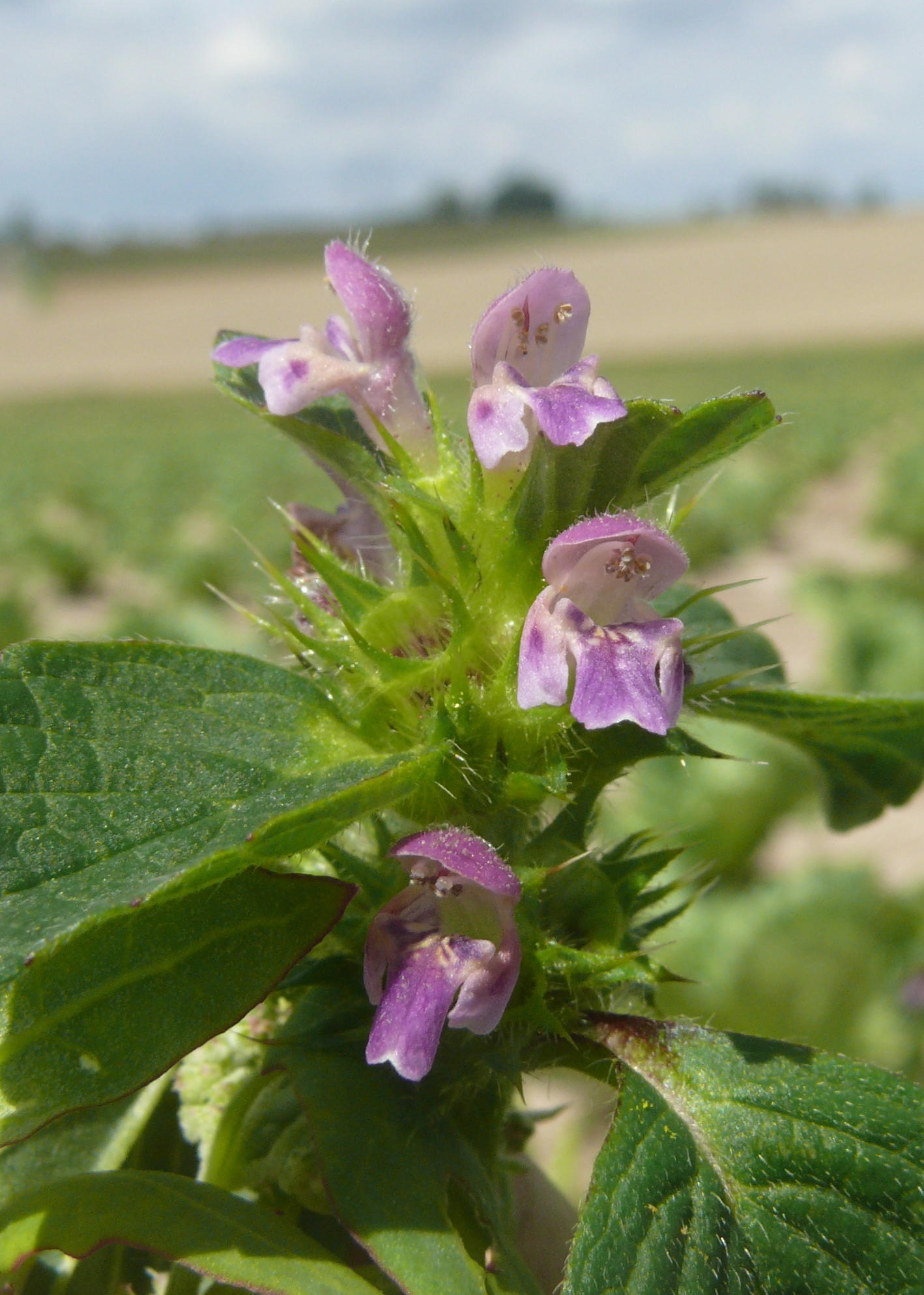 Galeopsis bifida, Hohenlohe, Deutschland